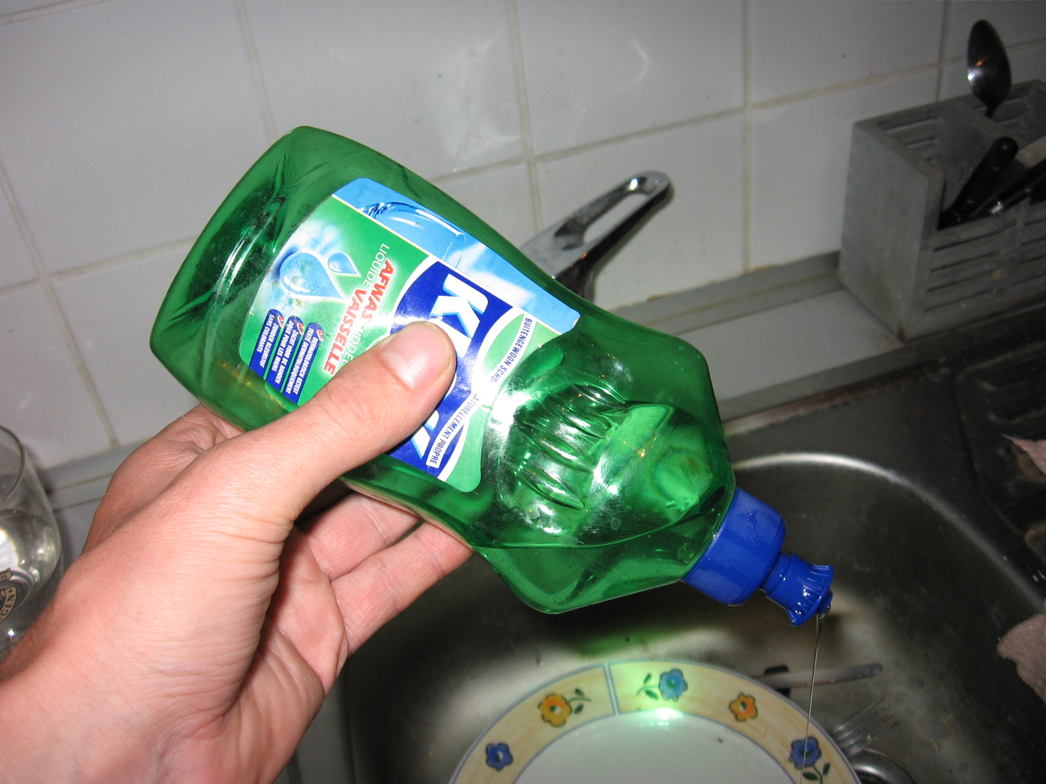 afwasmiddel